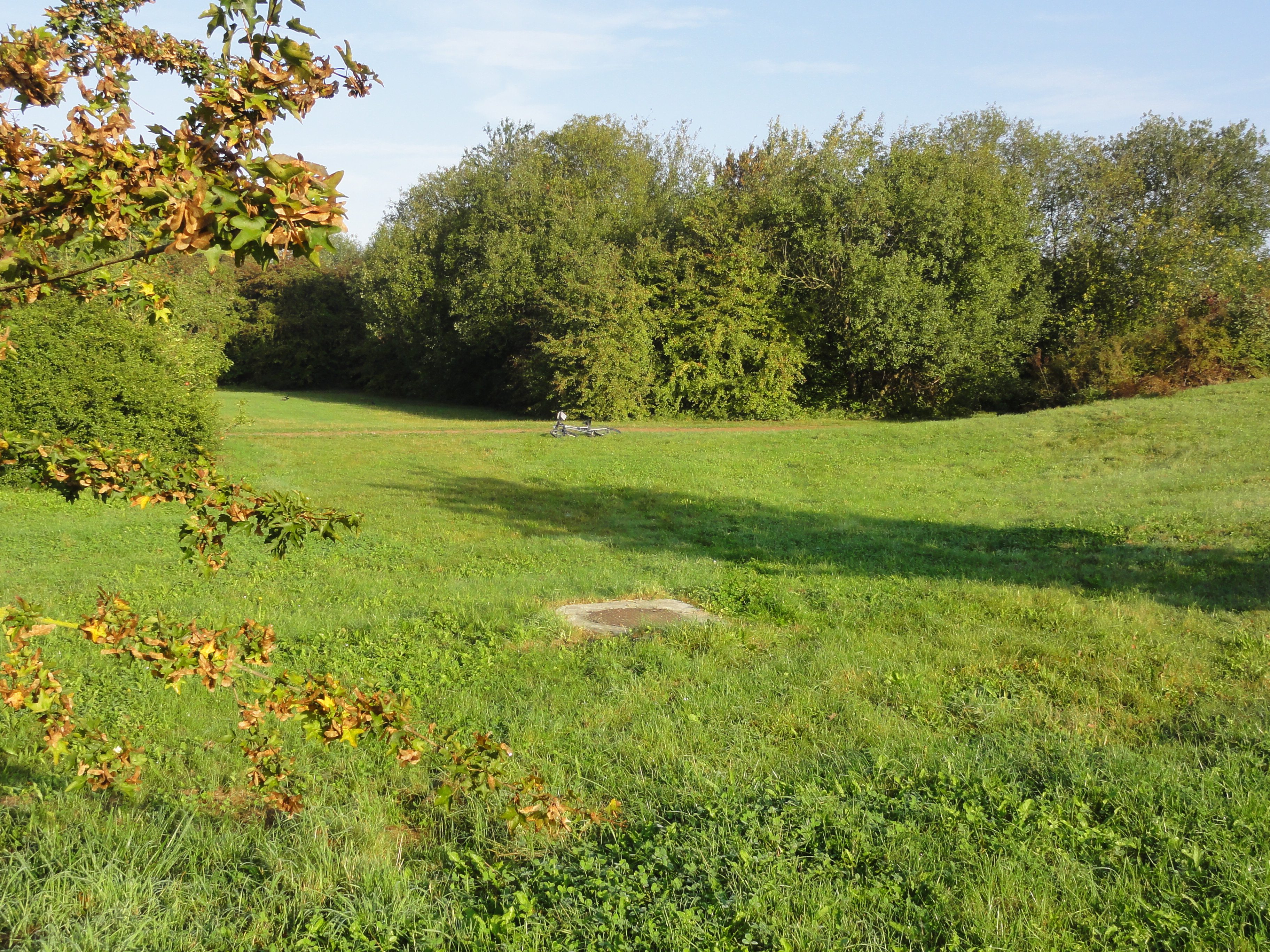 La fosse n° 8 - 8 bis de la Compagnie des mines de Béthune était un charbonnage du bassin minier du Nord-Pas-de-Calais constitué de deux puits situé à Auchy-les-Mines, Pas-de-Calais, Nord-Pas-de-Calais, France.